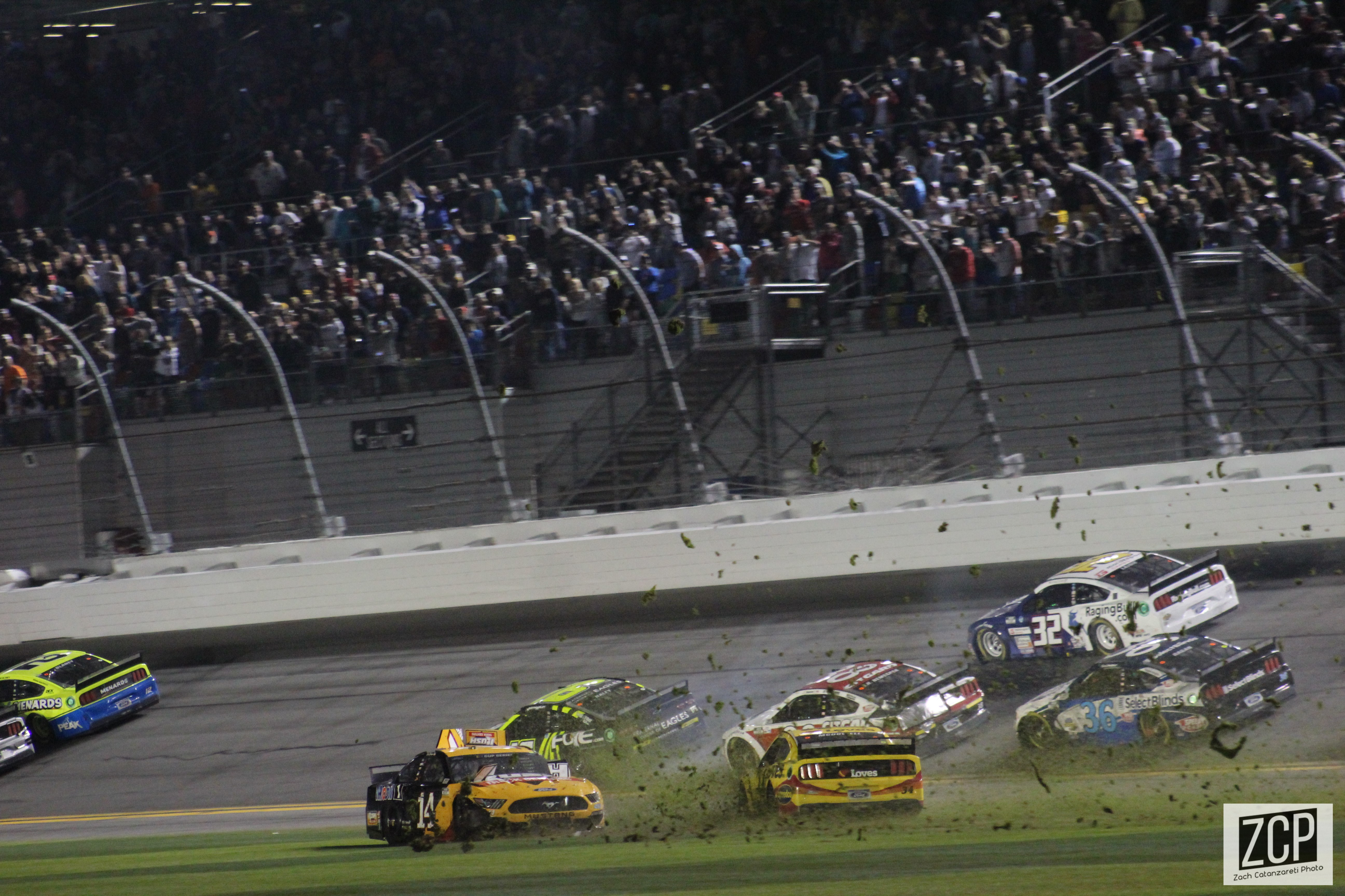 Daytona Speekweeks, 2020